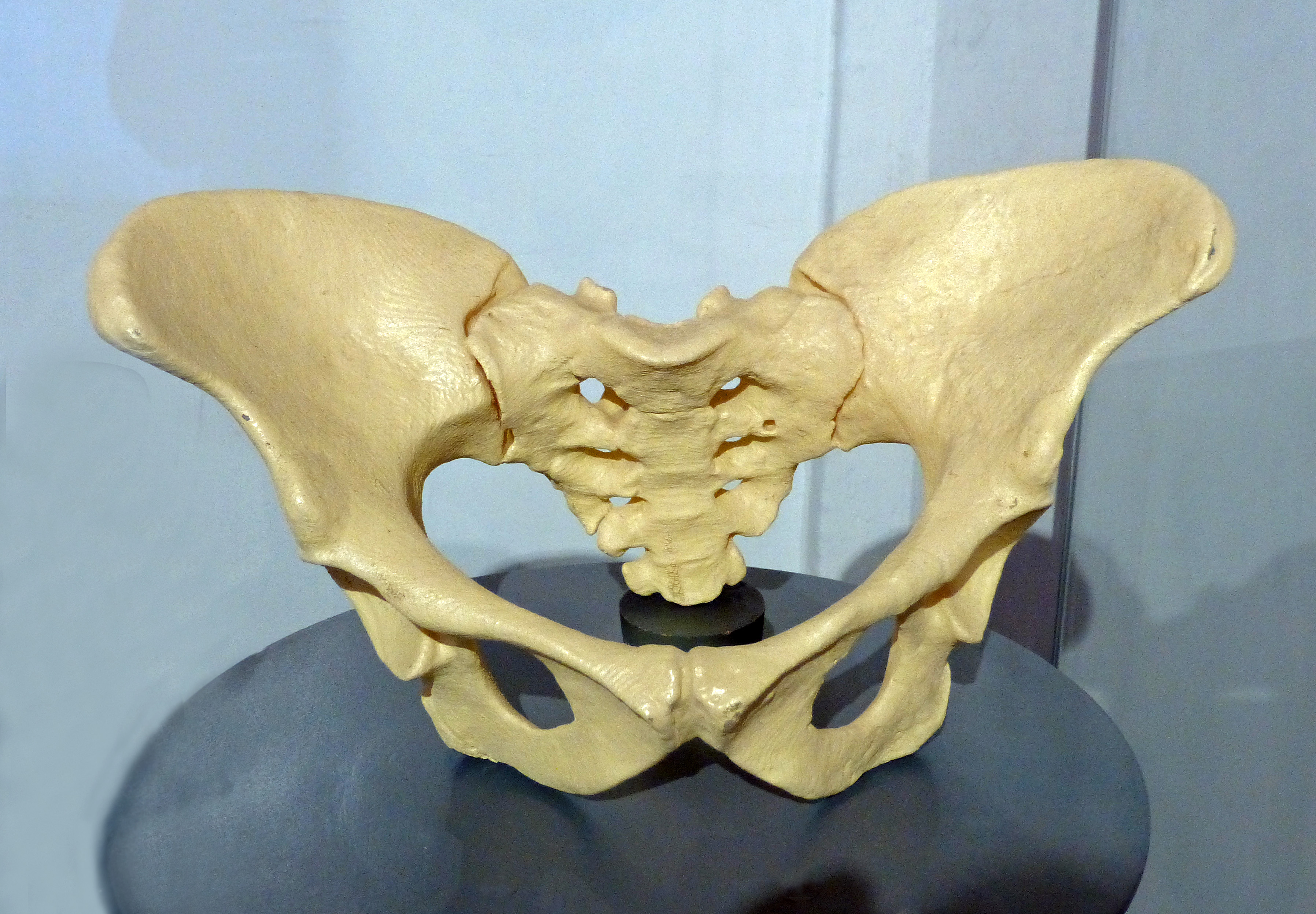 Addis Ababa, National Museum of Ethiopia : Australopithecus afarensis (Lucy) pelvis (reconstr.). 3.2 million years old.